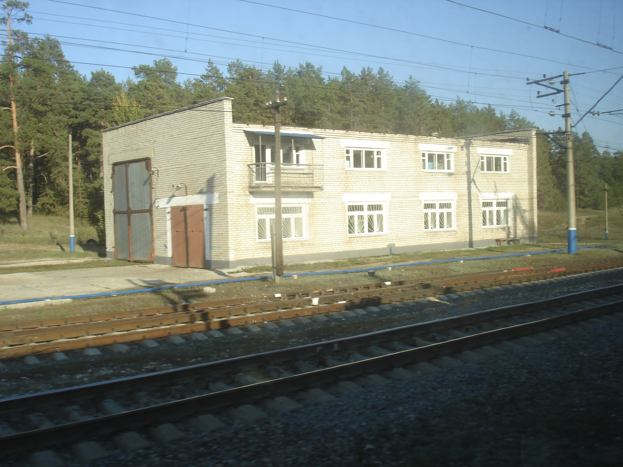 ЖД-станция Курумоч, станционное сооружение